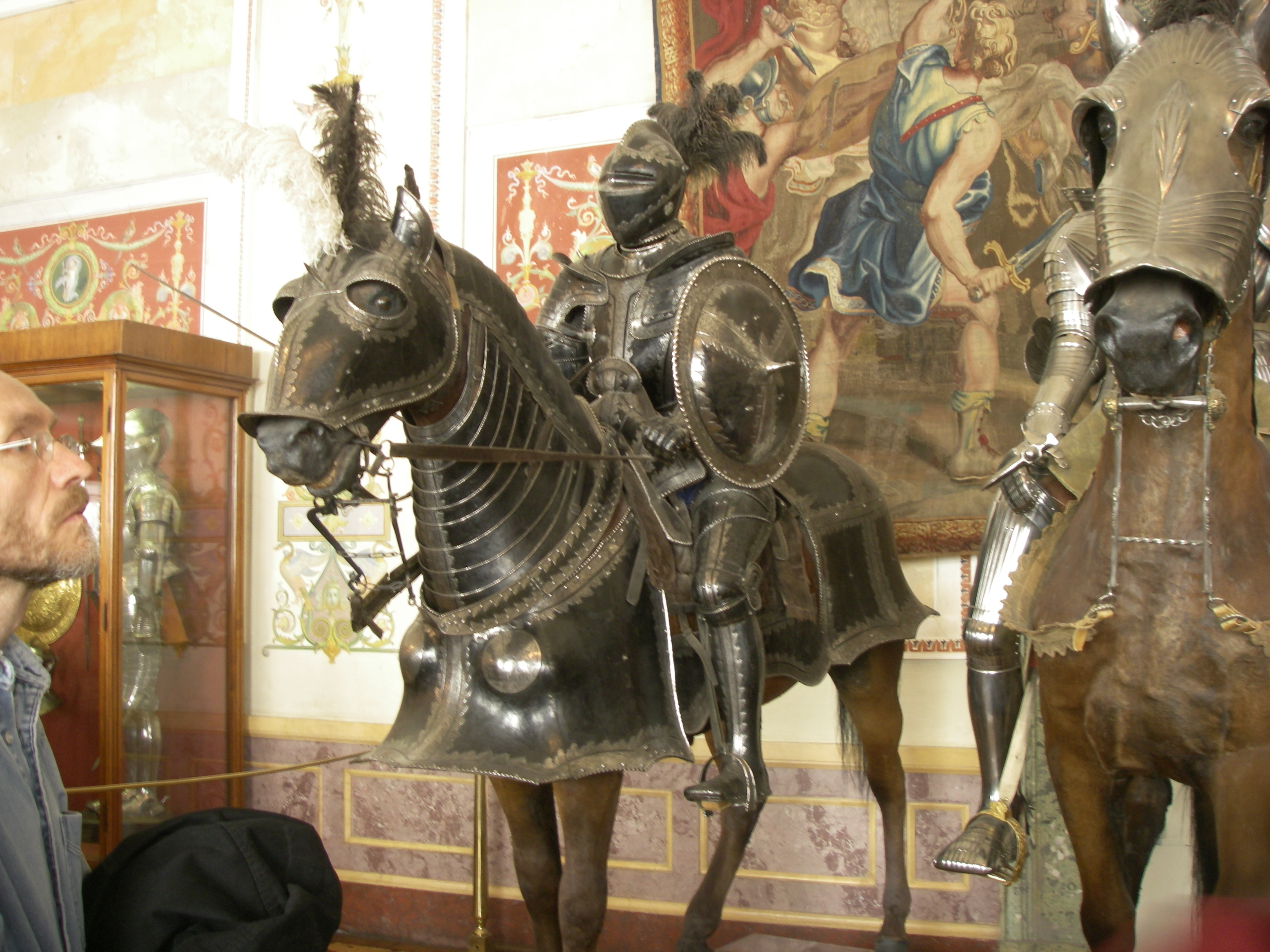 Конный рыцарь (рыцарский зал Эрмитажа), Санкт-Петербург.